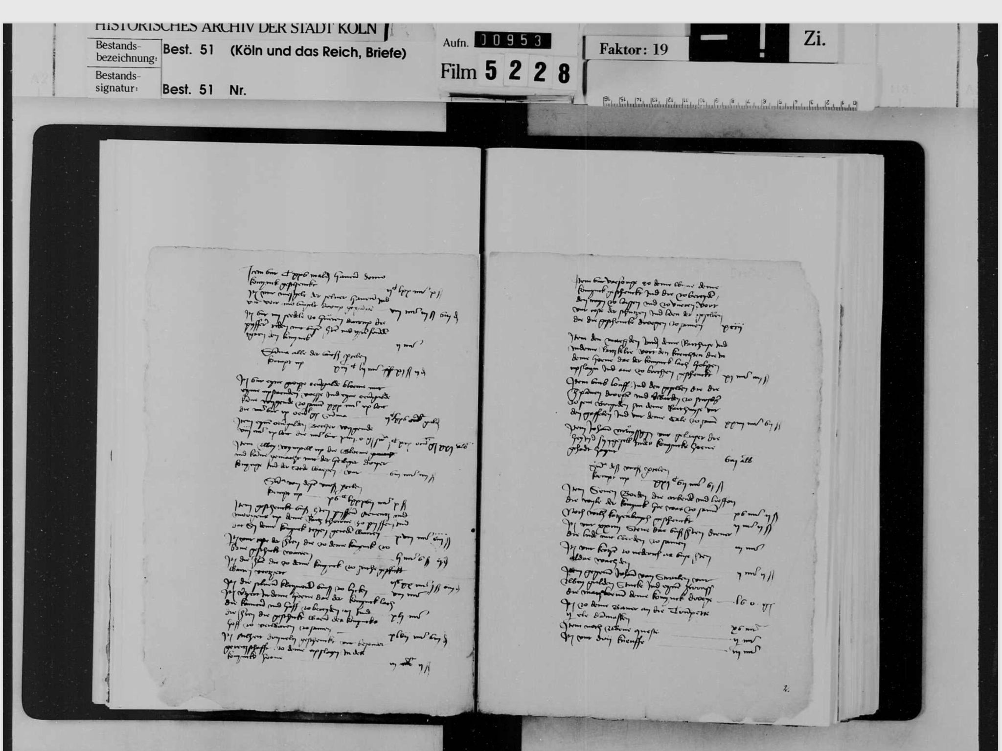 Best. 51: Köln und das Reich A 415 (Festschmuck zum Kaiserbesuch 1442) im Kölner Stadtarchiv; Dokument auf Mikrofilm zum Leben Stefan Lochners